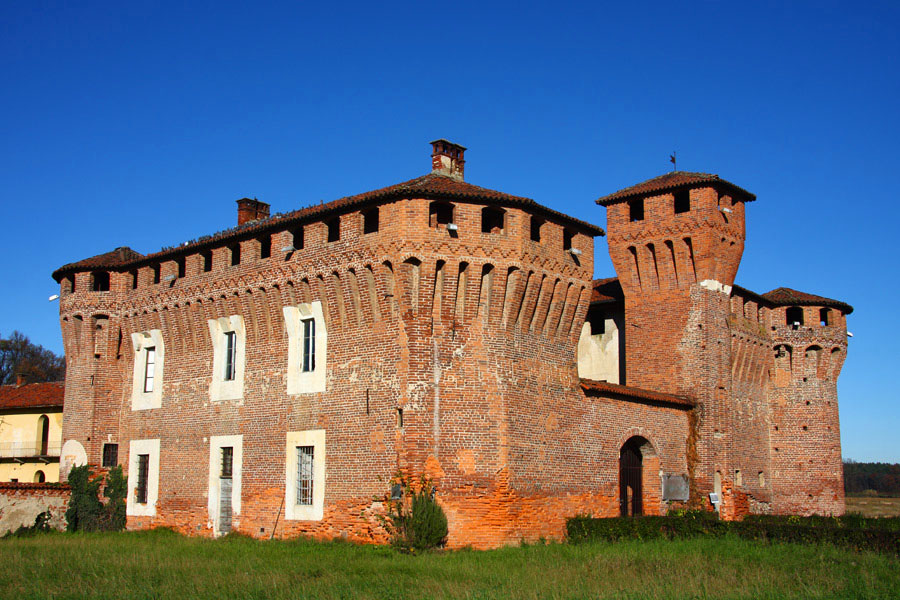 Castello di Proh, frazione di Briona (NO)